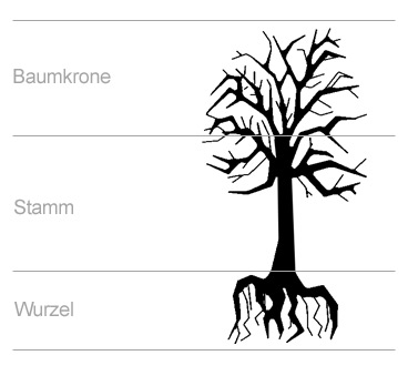 Aufteilung eines Baums